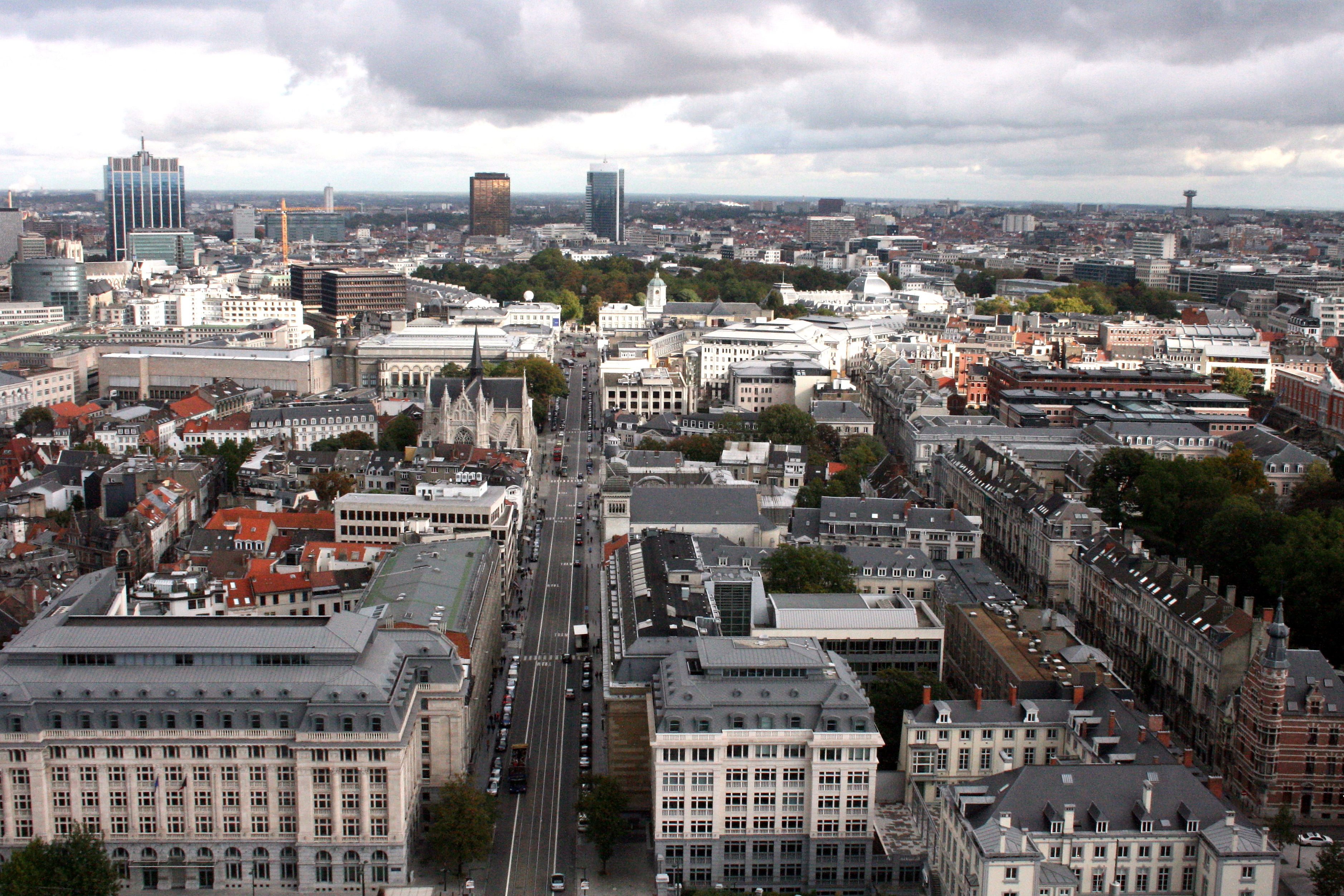 Vue du Nord-Est de Bruxelles depuis la coupole du Palais de justice